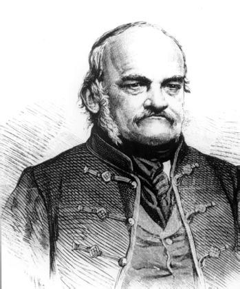 Fényes Elek (1807–1876) statisztikai és földrajzi író, a Magyar Tudományos Akadémia tagja. Pollák Zsigmond metszete